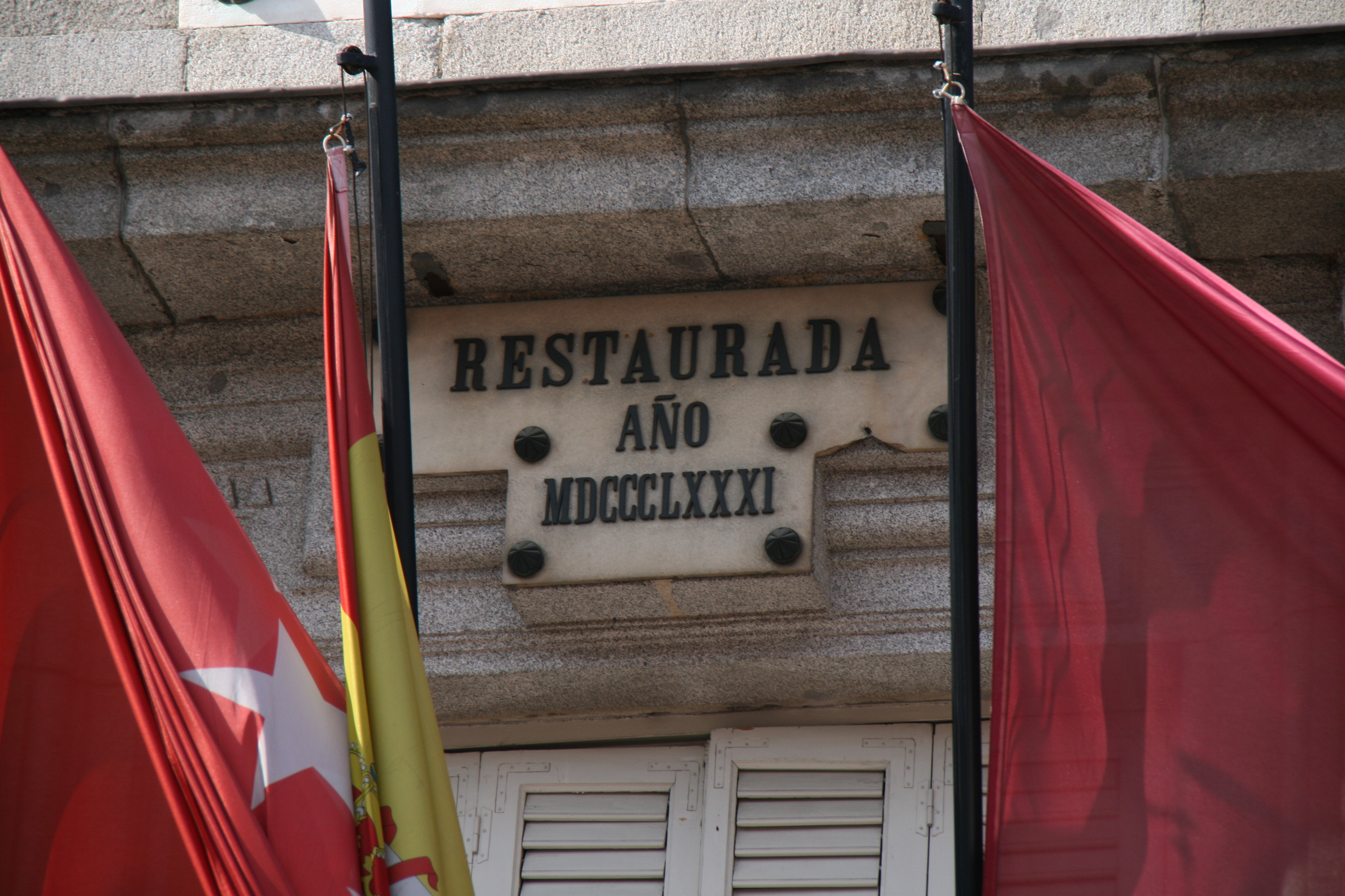 Fecha de la restauración